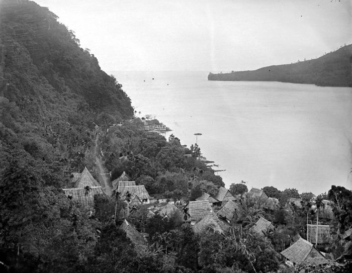 Negatief. Lontor, Bandanaira, van boven gezien